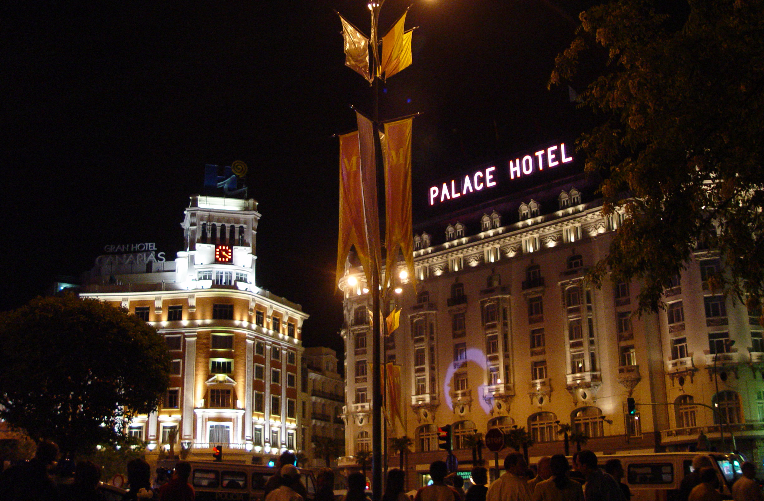 Hotel Palace engalando y con luces celebrativas durante los días previos a la boda del Príncipe Felipe